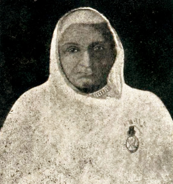 ritratto della Begum regnante di Bhopal Qudsia (1801-1881)